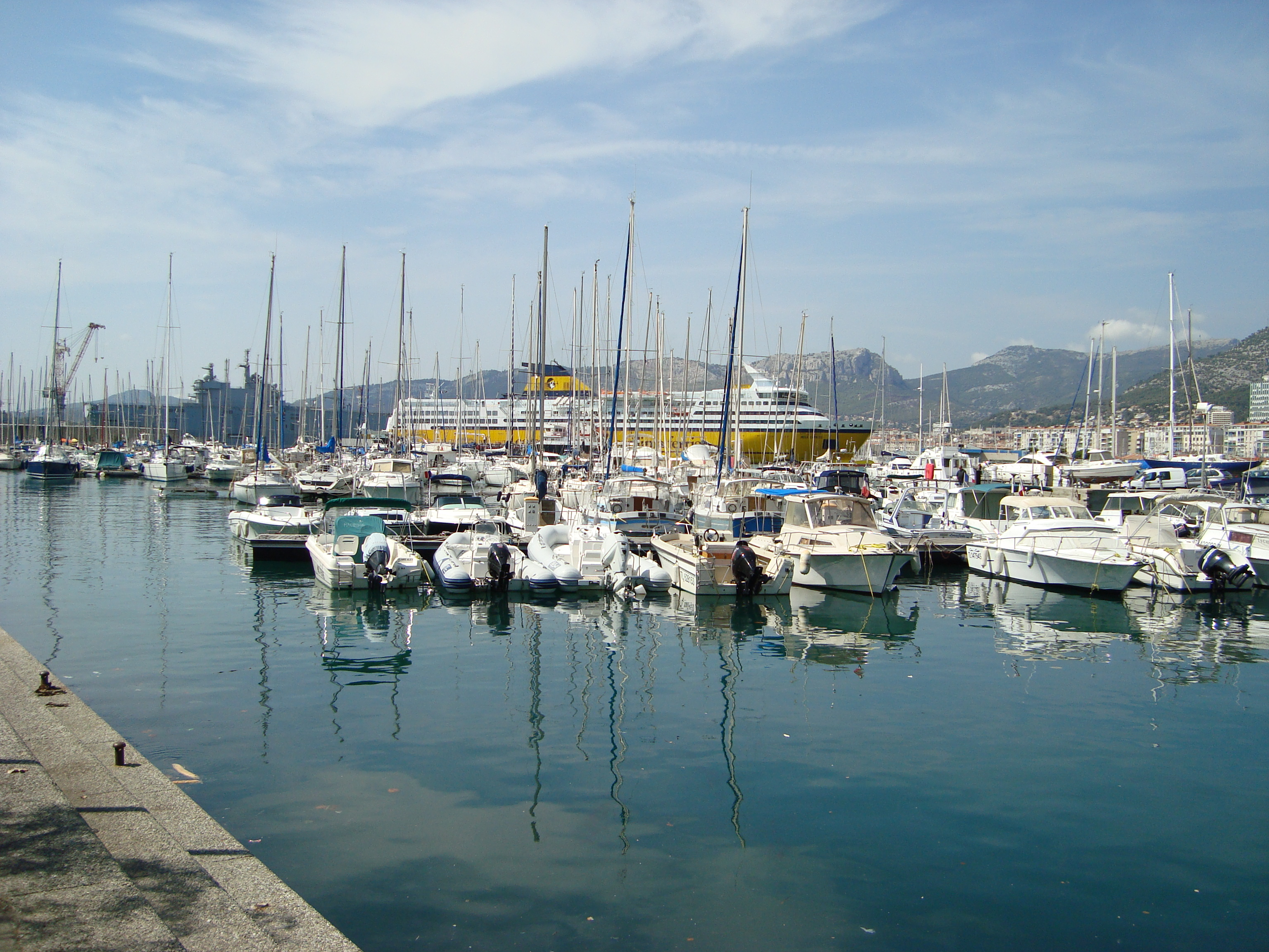 Toulon